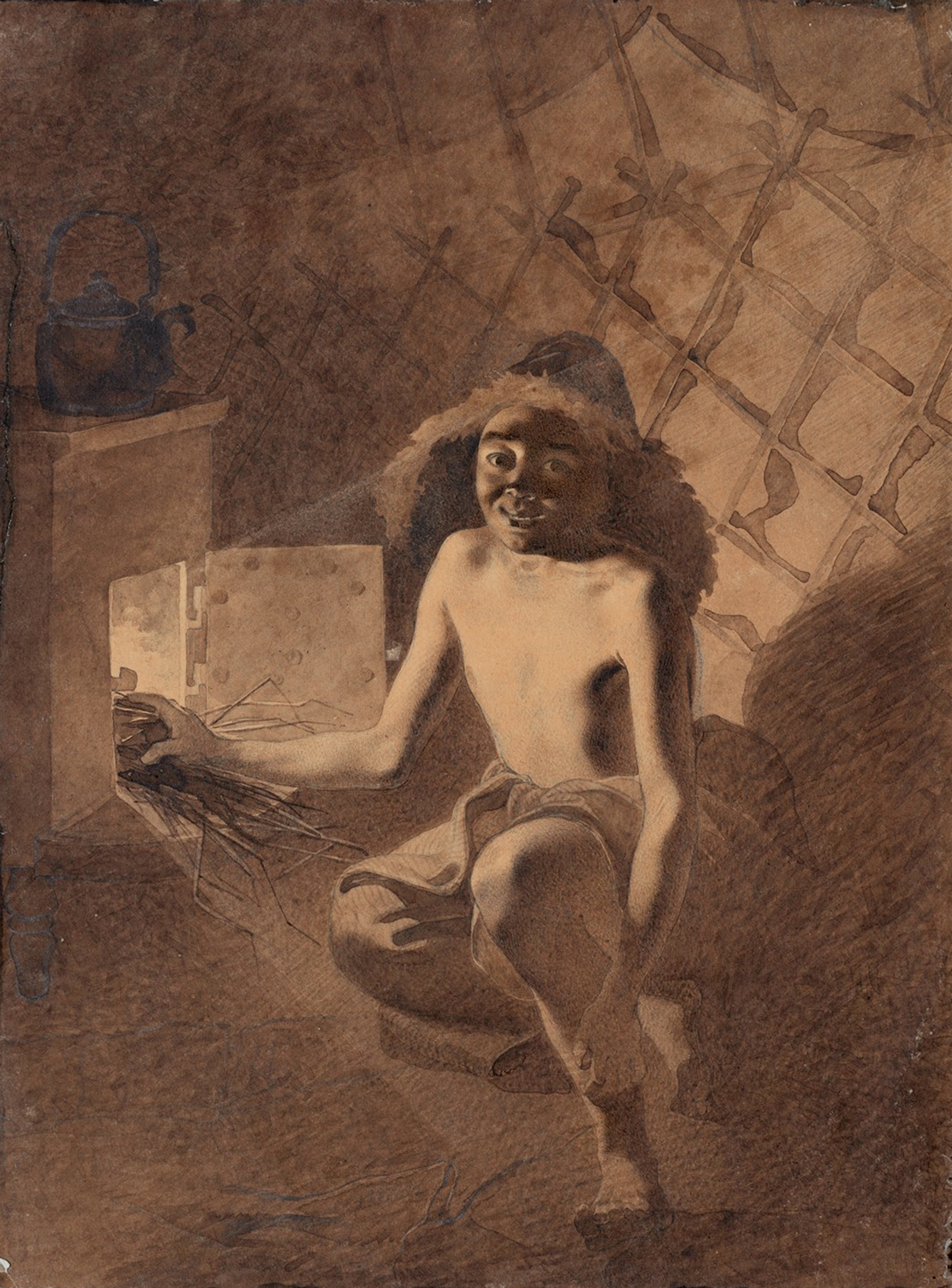 Тарас Шевченко. Хлопчик розпалює грубку. 1848 Шевченко подарував цей малюнок начальникові експедиції О.І.Бутакову, коли той у січні 1850 р. виїджав до Петербурга. На звороті малюнка Шевченко записав: «Веневитинова и Кольцова, въ одном переплете». Малюнок виконаний під час зимівлі учасників Аральської експедиції на острові Косарал (з 26 вересня 1848 р. до 6 травня 1849 р.). Тривалий час малюнок зберігався в родинах Бутакових-Глазенапів, а 1912 р. був переданий в Україну. Сепія. 24,7 × 18,3 Місце створення: Казахстан, Кизилординська область, Аральський район, острів Косарал.